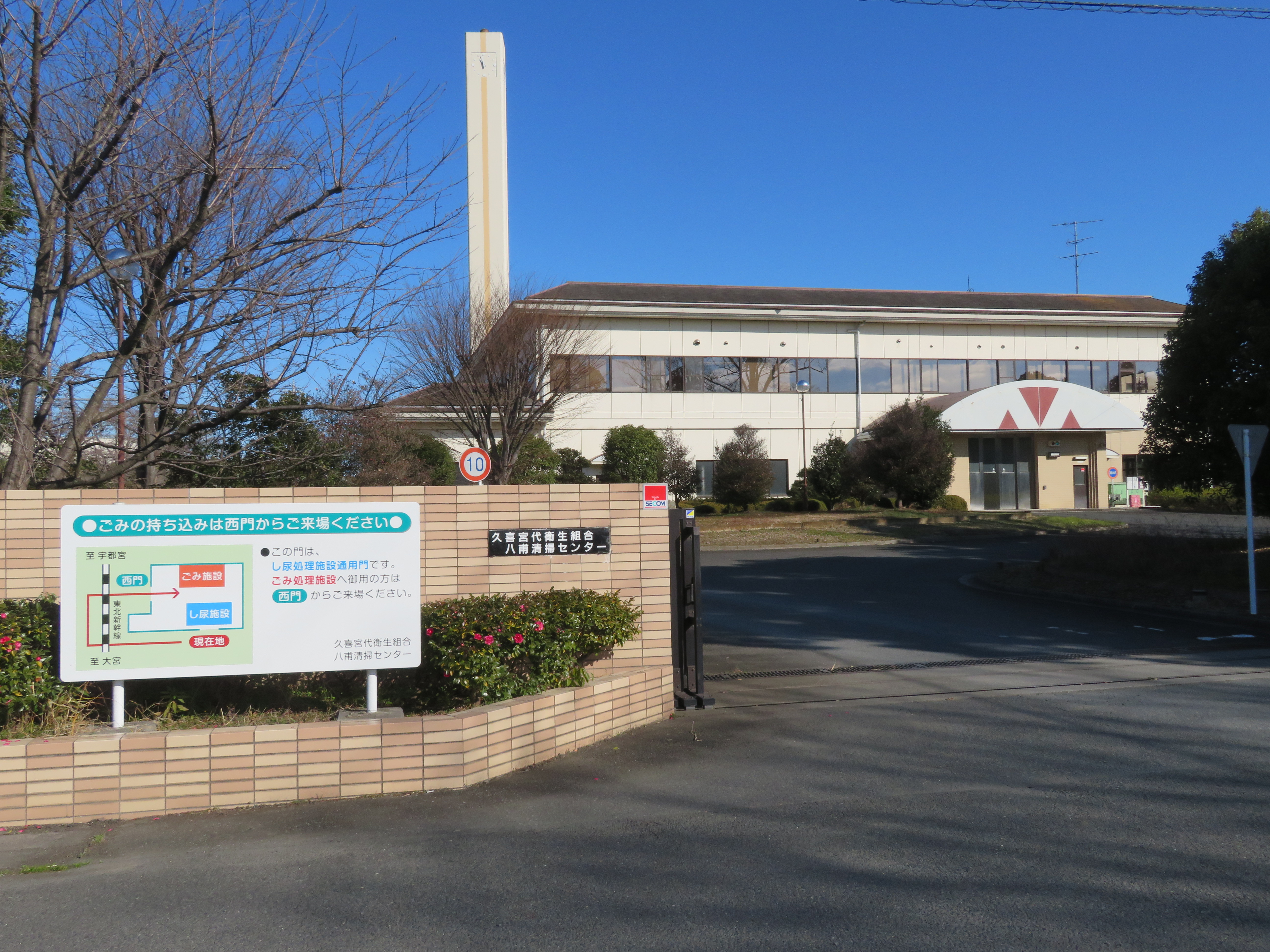 埼玉県久喜市に所在する久喜宮代衛生組合八甫清掃センター Canon PowerShot SX720 HS